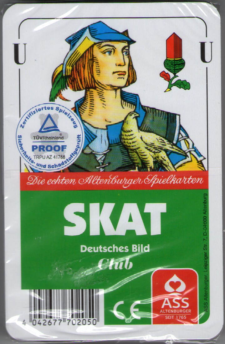 Foto des Deckblattes eines Skatspieles mit Deutschem Bild (Altenburg)